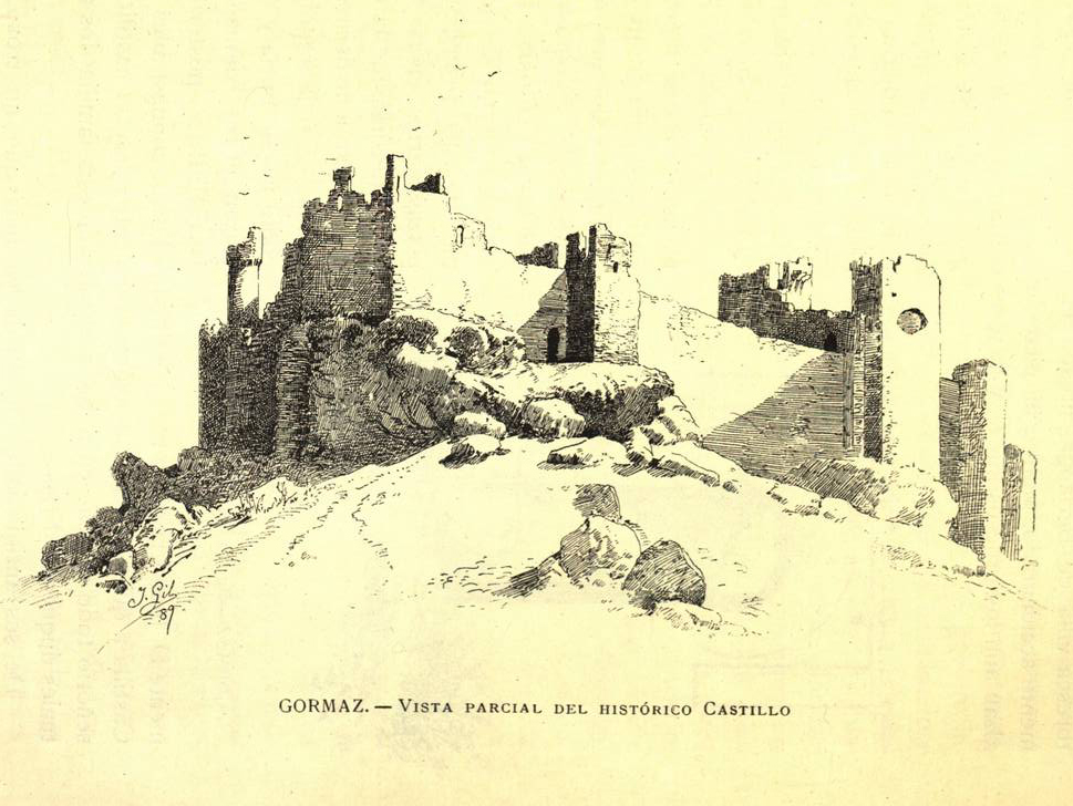 Gormaz. Vista parcial del histórico castillo.